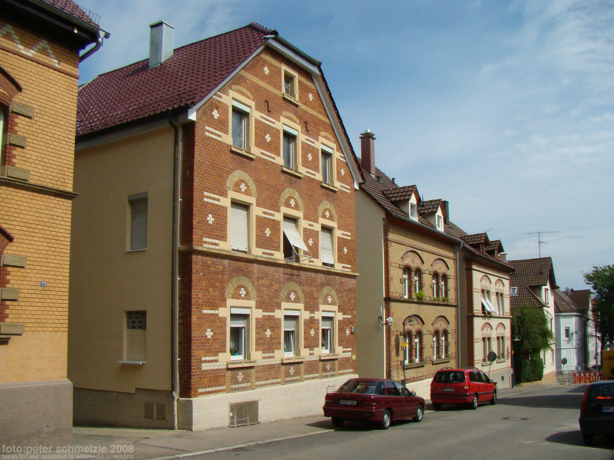 Denkmalgeschütztes Wohnhaus Eppinger Str. 68 in Heilbronn-Böckingen